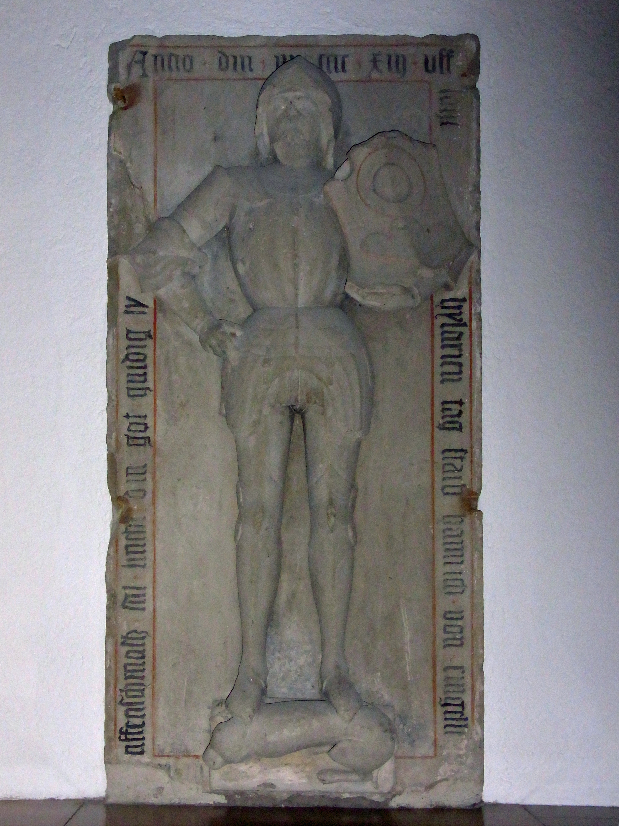 Albstadt-Ebingen:Martinskirche - Ritter Affenschmalz (Heinrich von Killer zu Ringelstein)